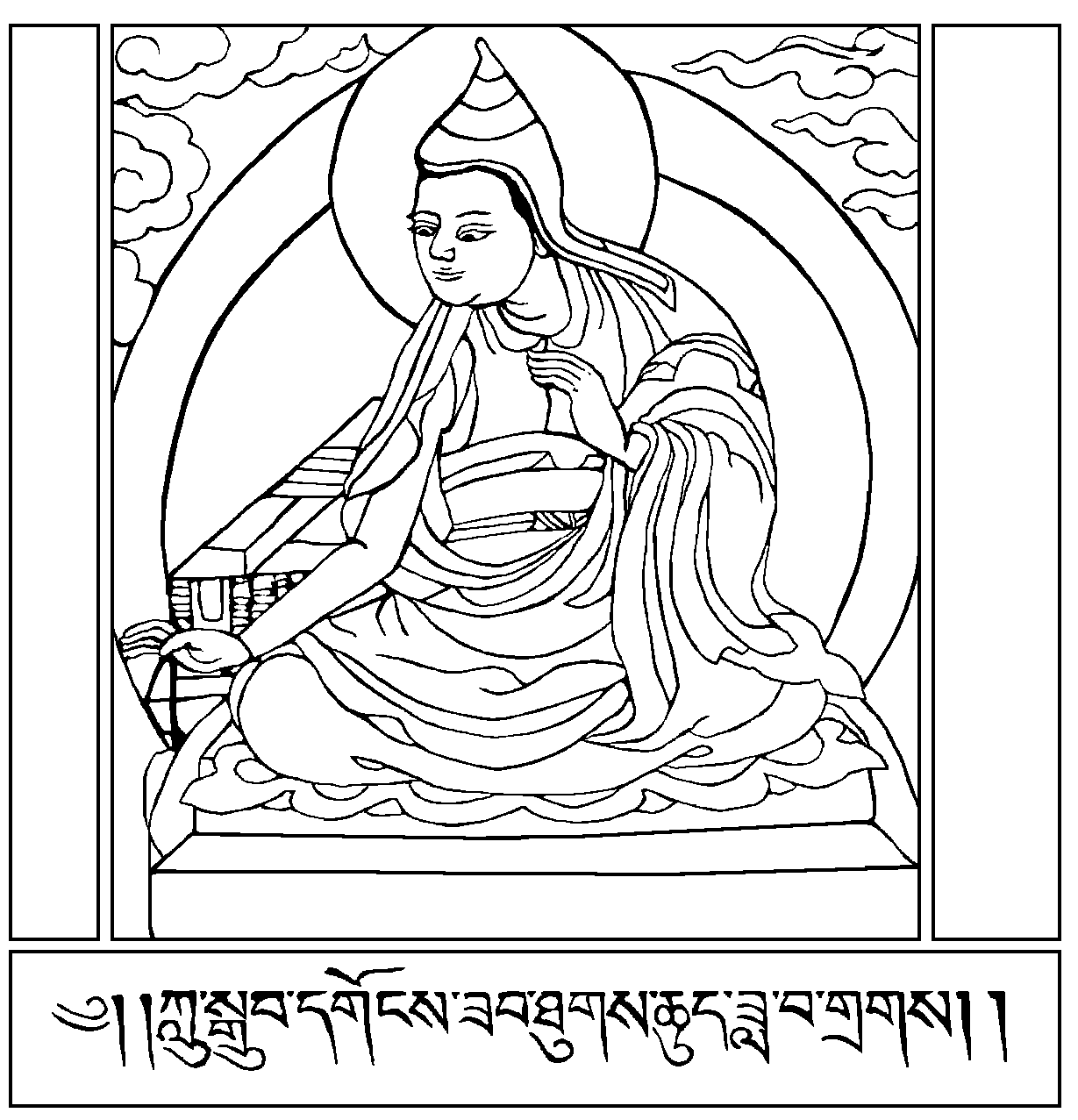 Hình được phép công bố của trang vi: ACIP Thể loại:Đồ tượng Phật giáo